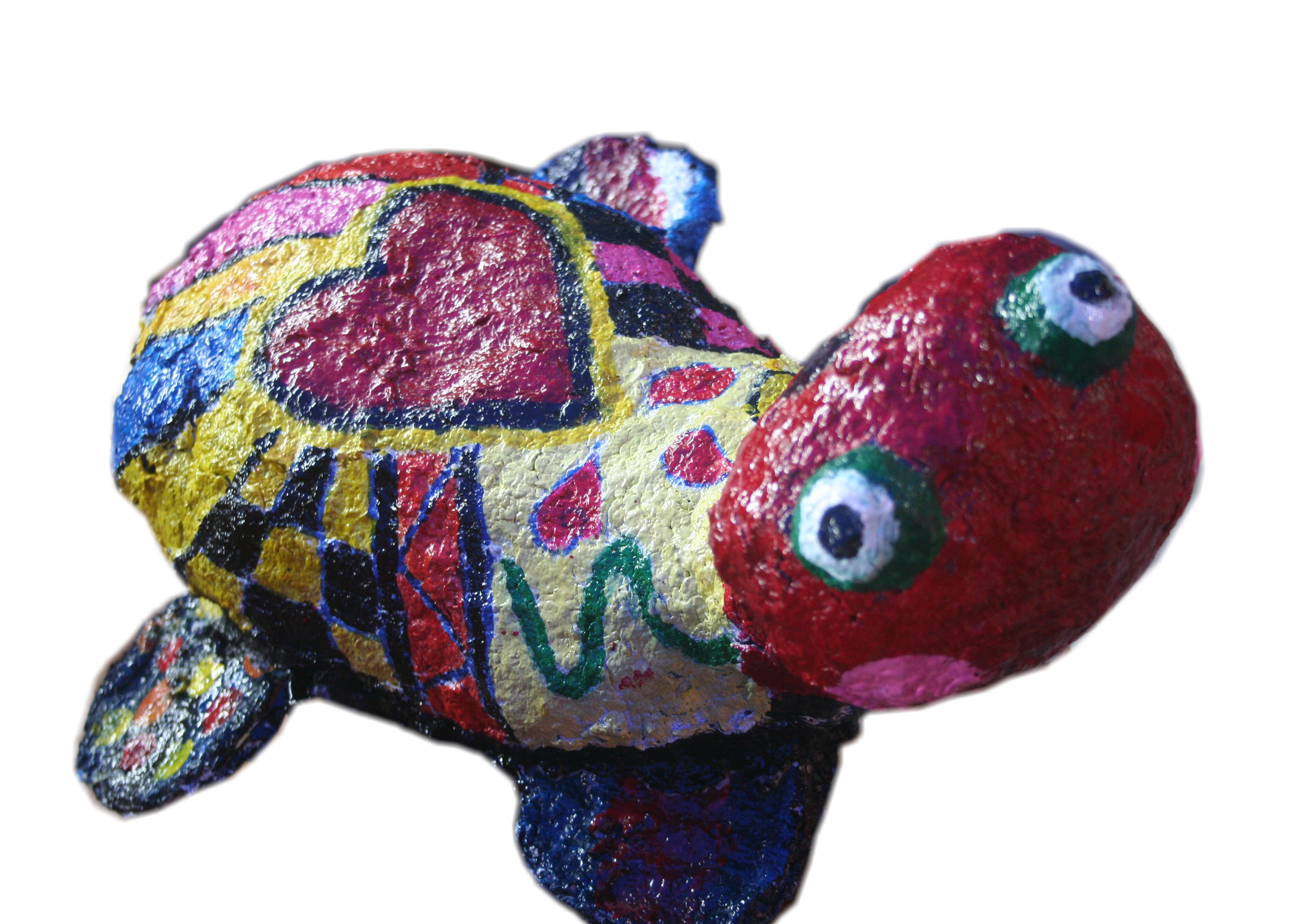 papel